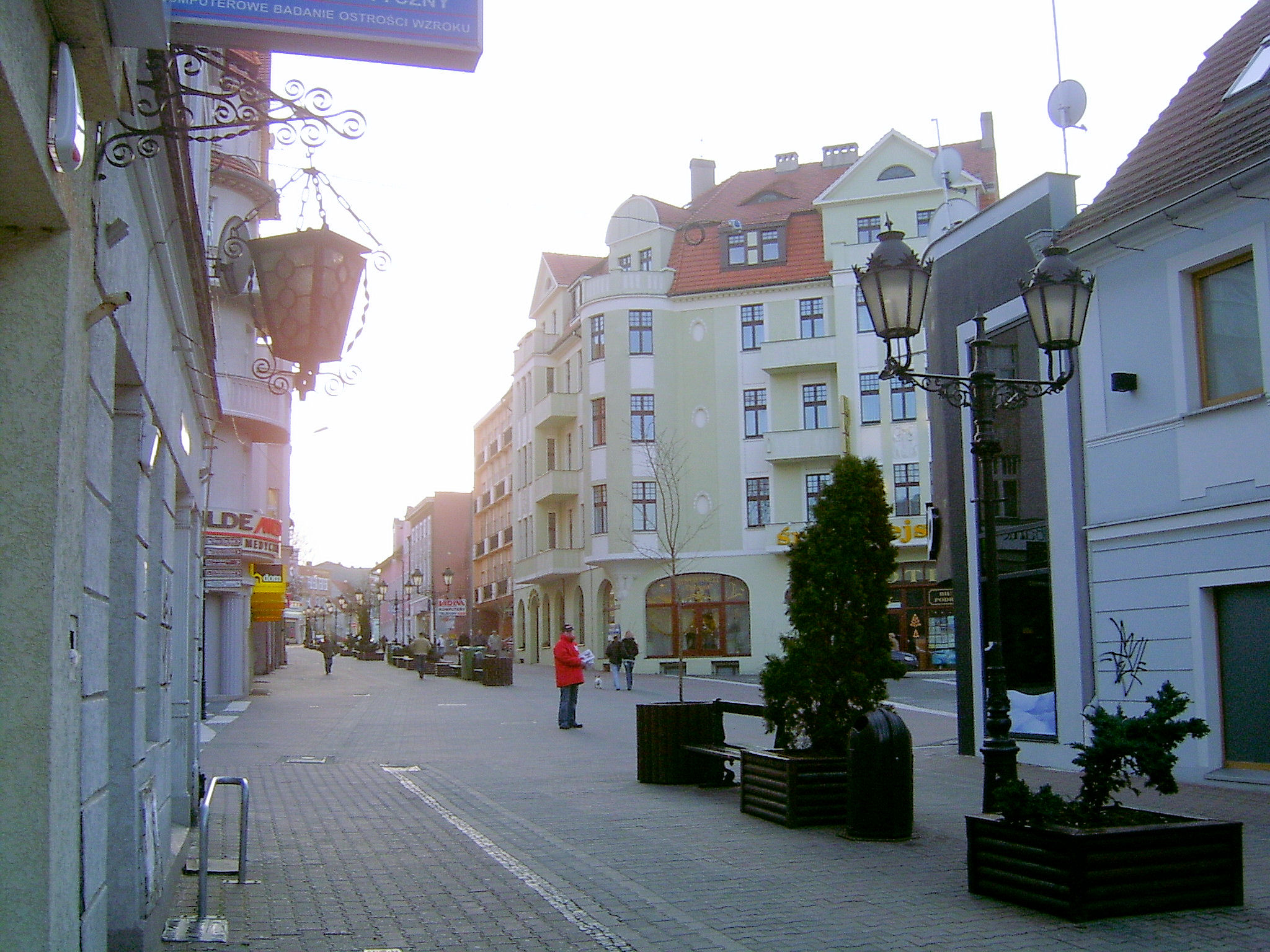 Zielona Góra